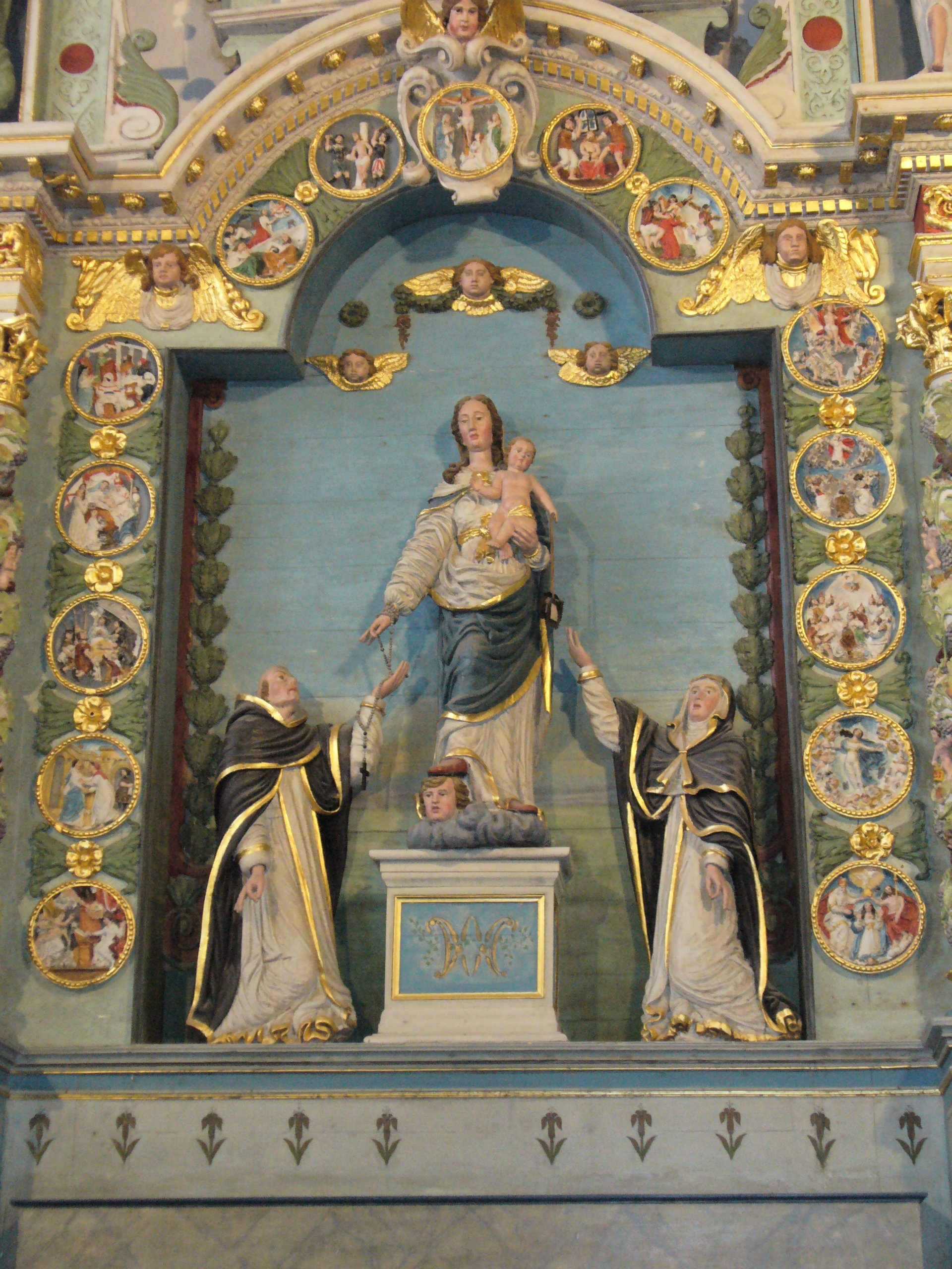 Rosenkranzaltar-Altar des Heiligen Rosenkranzes(17.Jh.)-In der Mitte Jungfrau Maria umgeben von Dominikus und Katharina von Siena umgeben von Medaillons die Geheimnisse Des Heiligen Rosenkranzes bergend.-Saint Miliau-Guimiliau